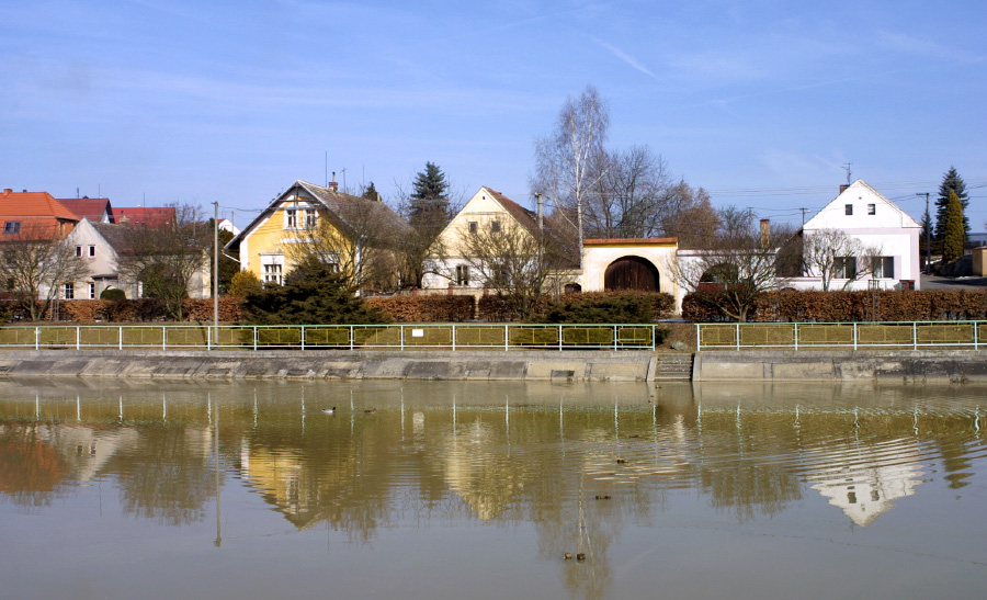 Domy a nádrž na návsi v Druztové.